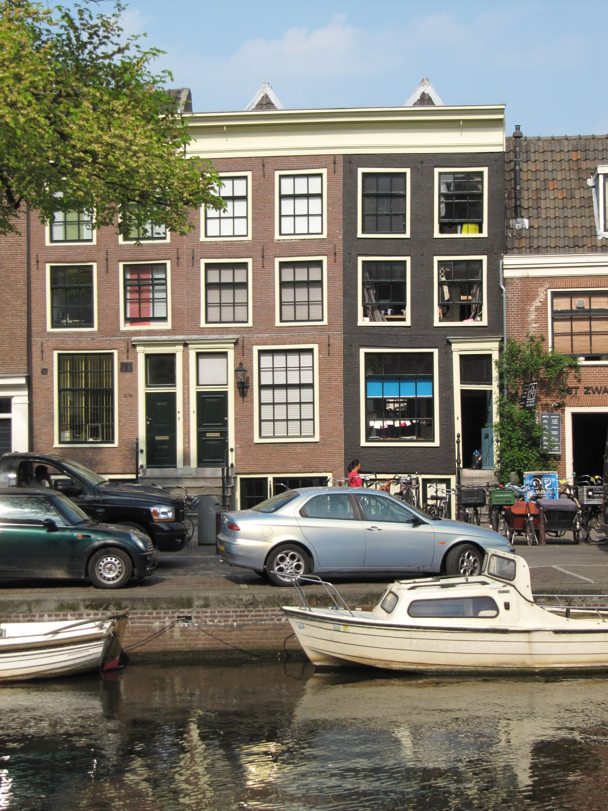 RM3645 RM3646 Amsterdam - Lijnbaansgracht 280 en 281.jpg